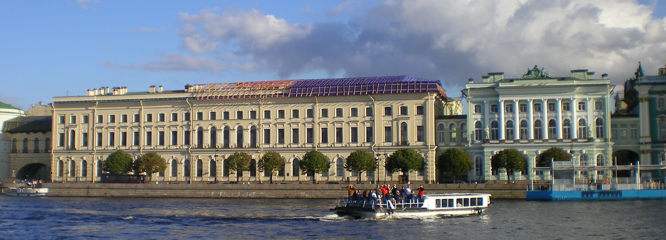 Old Hermitage and Small Hermitage, Saint Petersburg